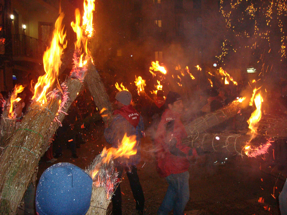 Fia-Faia de Bagà. Festa ancestral que se celebra el vespre abans de Nadal.